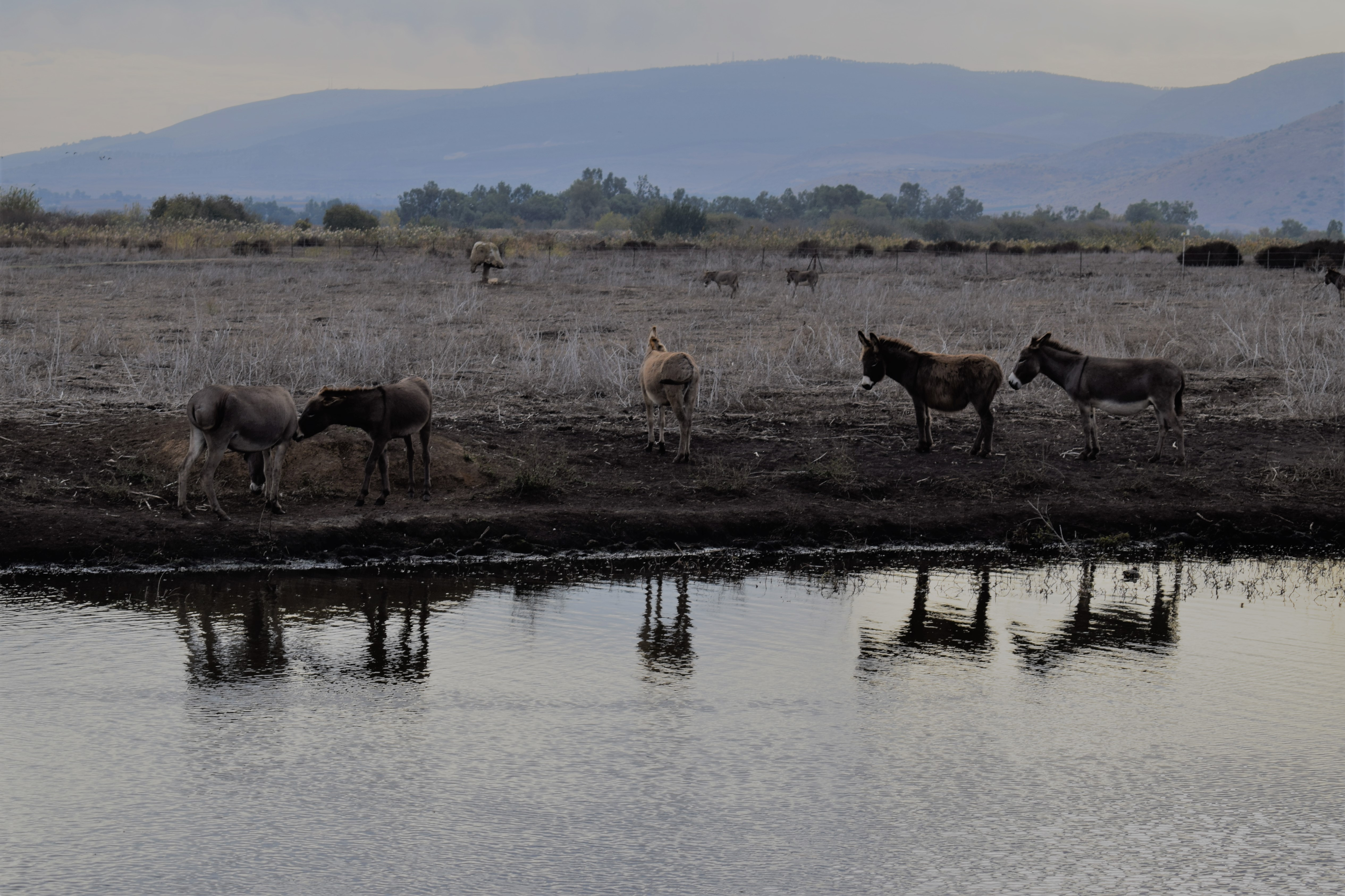 חמורים באגמון החולה